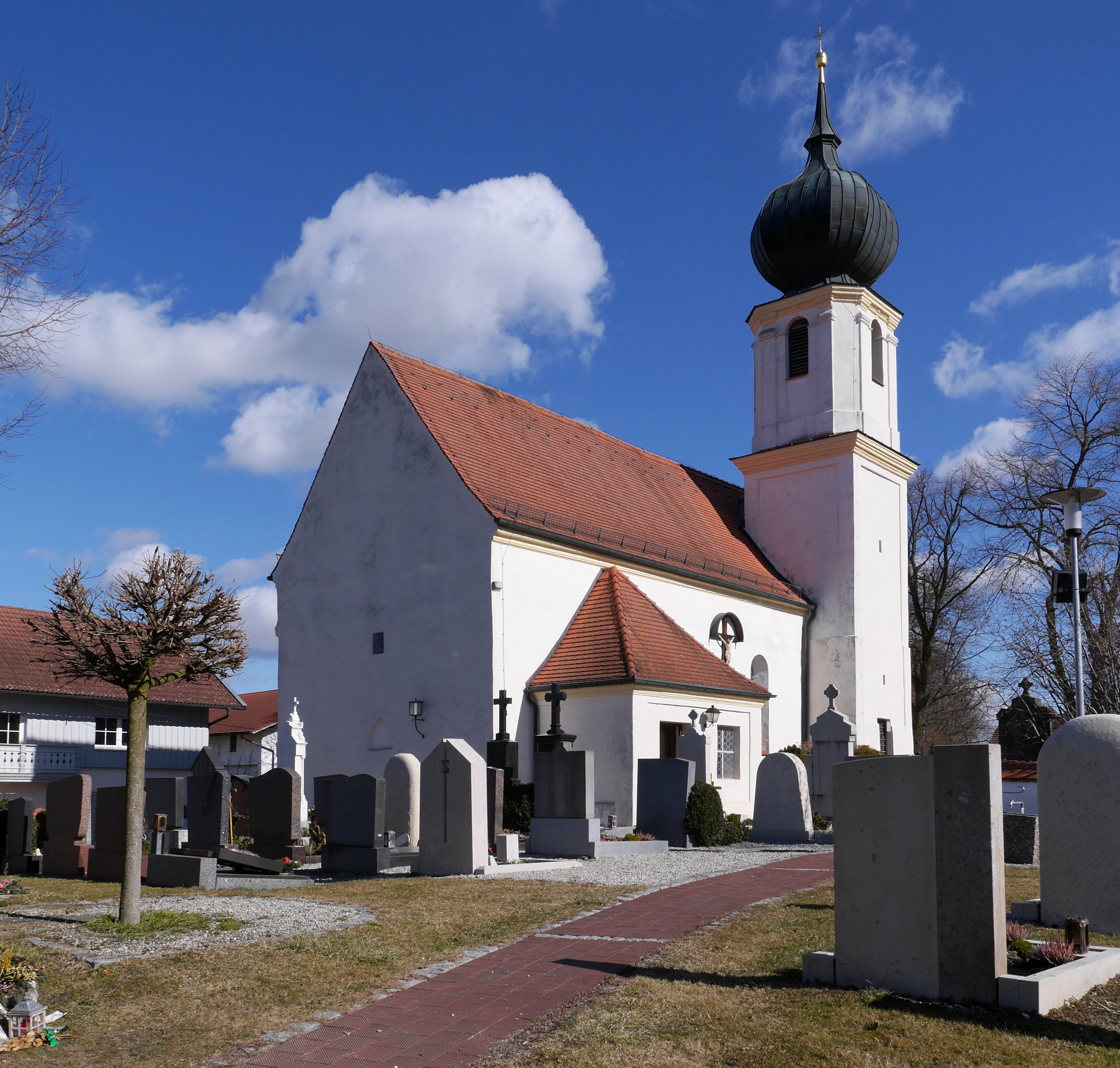 Katholische Filialkirche St. Petrus in Weidenbach, Blick von der Rattenkirchner Straße This is a photograph of an architectural monument.